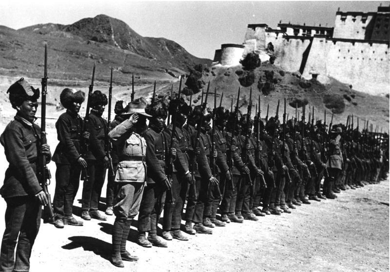 Schigatse, tibetisches Militär mit Dzong, Truppenparade